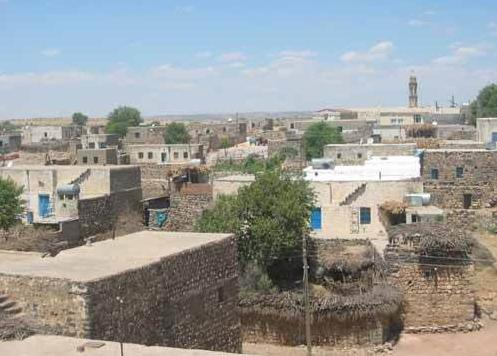 Das Dorf Midun